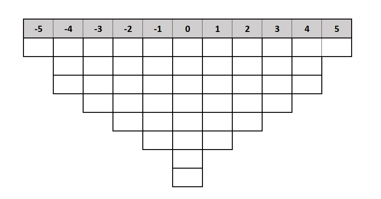 Q-rendezéshez használt rácsháló. Az oszlopok rangszáma mutatja a résztvevő értékelését.